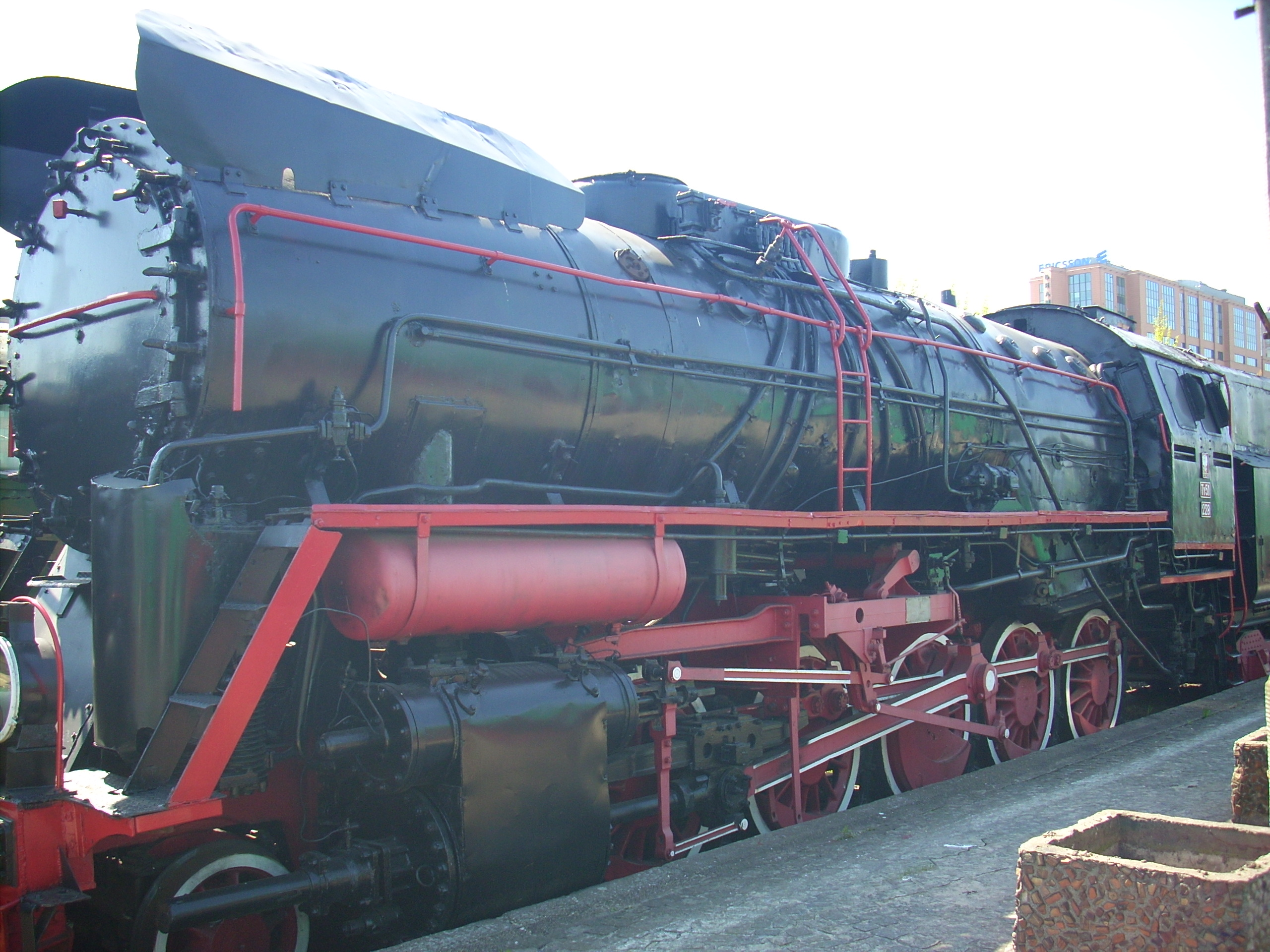 Lokomotywa parowa Baureihe Ty51 w Muzeum Kolejnictwa w Warszawie